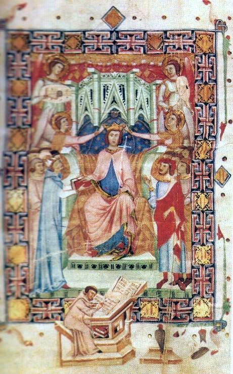 Jaume II de Mallorca jura els privilegis del regne de Mallorca el 1276. Miniatura pintada per Romeu Despoal (representat a baix) vers 1334 al Llibre de privilegis dels reis de Mallorca (Arxiu Històric Municipal de Palma)